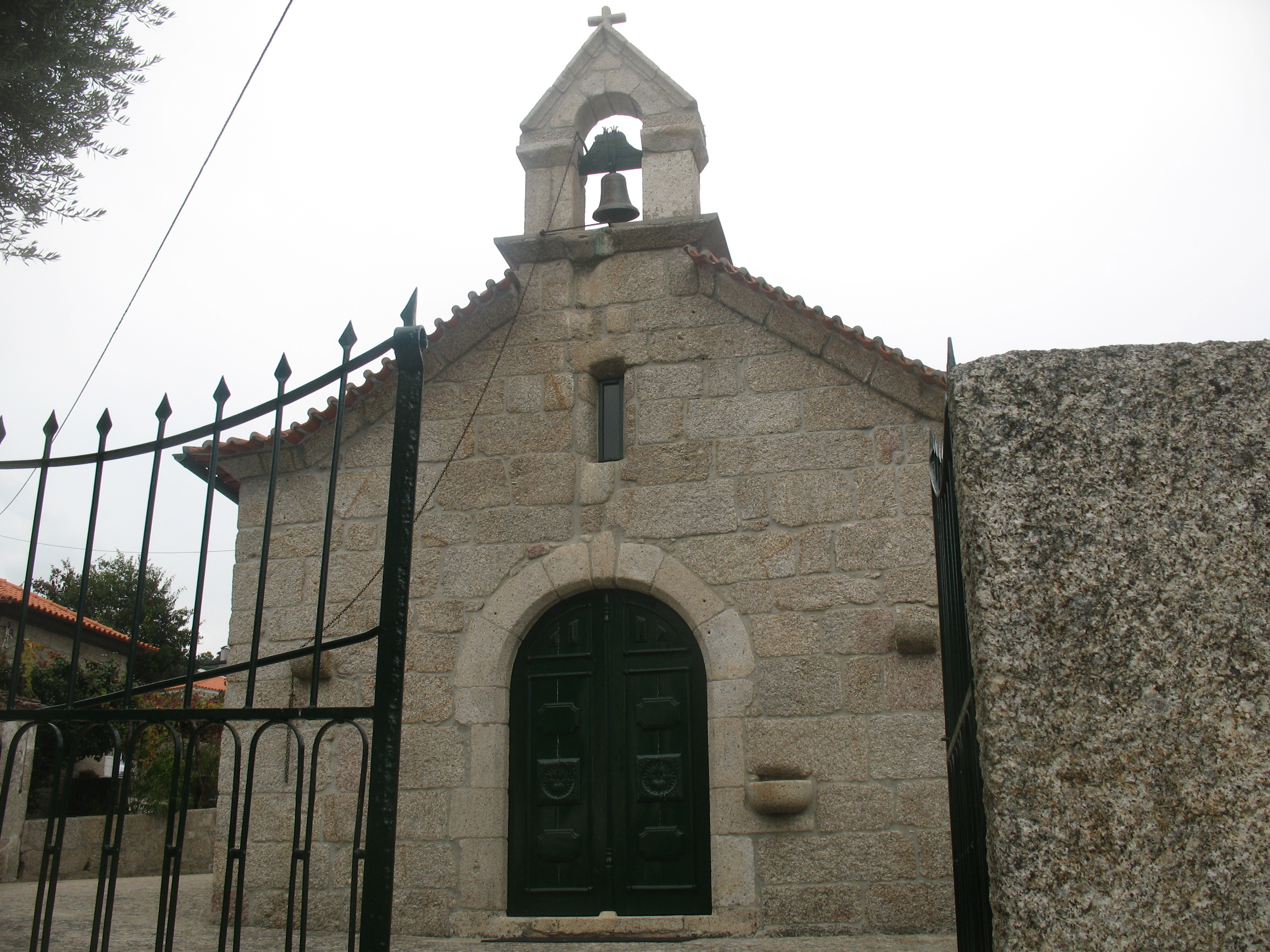 Amarante Igreja Matriz de Salvador do Monte